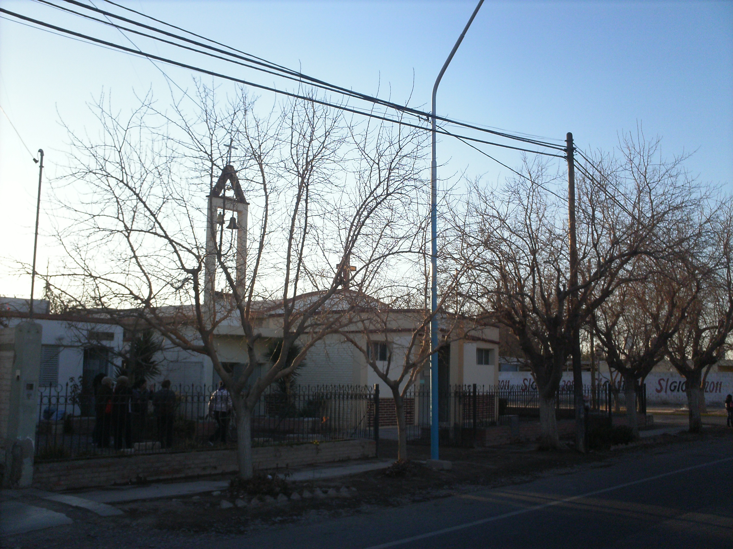 la iglesia catolica de la localidad